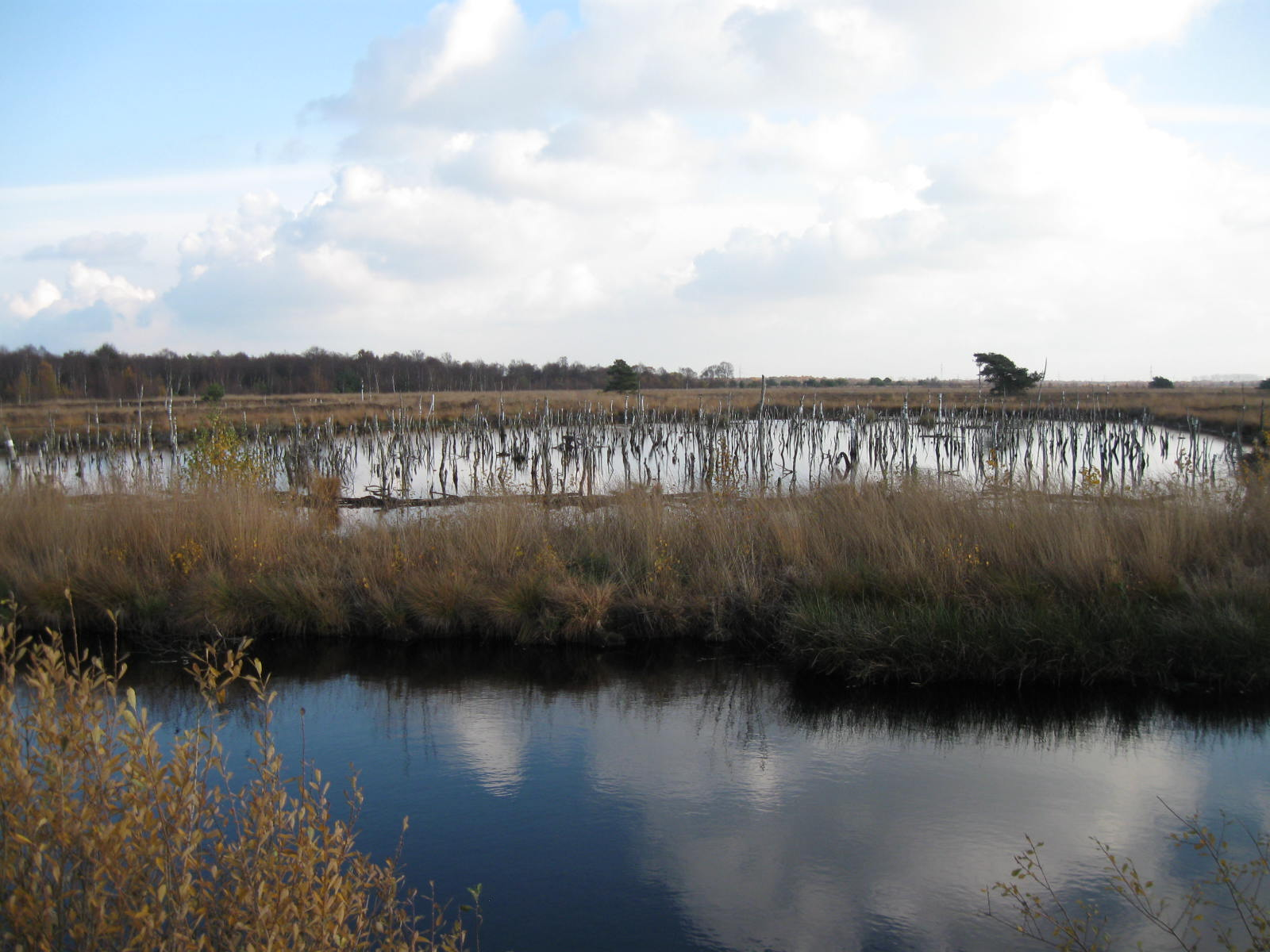 Das Naturschutzgebiet „Rehdener Geestmoor-Regenerationsgebiet“ ist ein ausgedehntes offenes Hochmoor in der Samtgemeinde Rehden, Landkreis Diepholz in Niedersachsen. Es ist ein repräsentatives Hochmoor für den Naturraum Diepholzer Moorniederung.